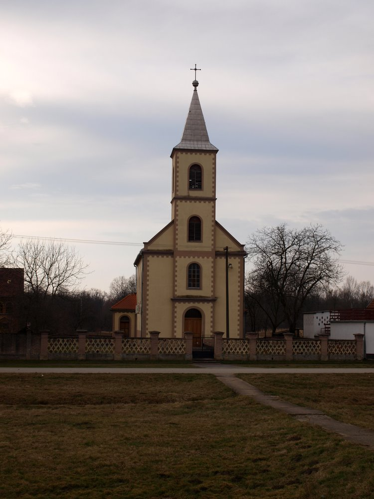 Grkokatolička crkva u Kaniži, Brodsko-posavska županija.